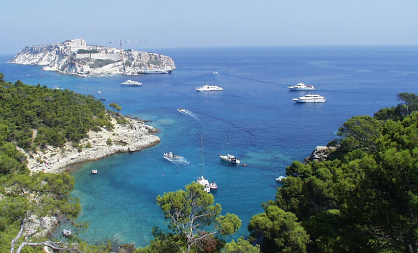 Blick auf San Nicola von San Domino